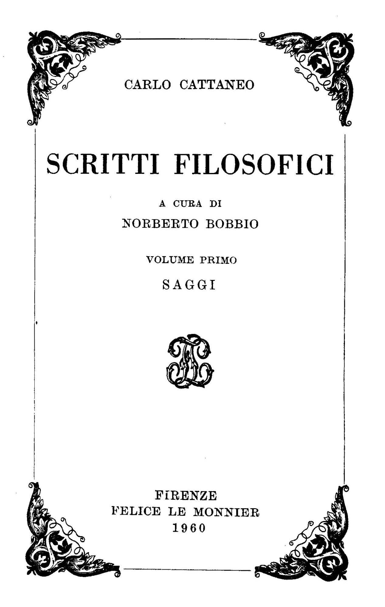 Scritti filosofici. 1 / Carlo Catteneo ; a cura di Norberto Bobbio. - Firenze : Le Monnier, 1960. - LVI, 496 p. ; 19 cm